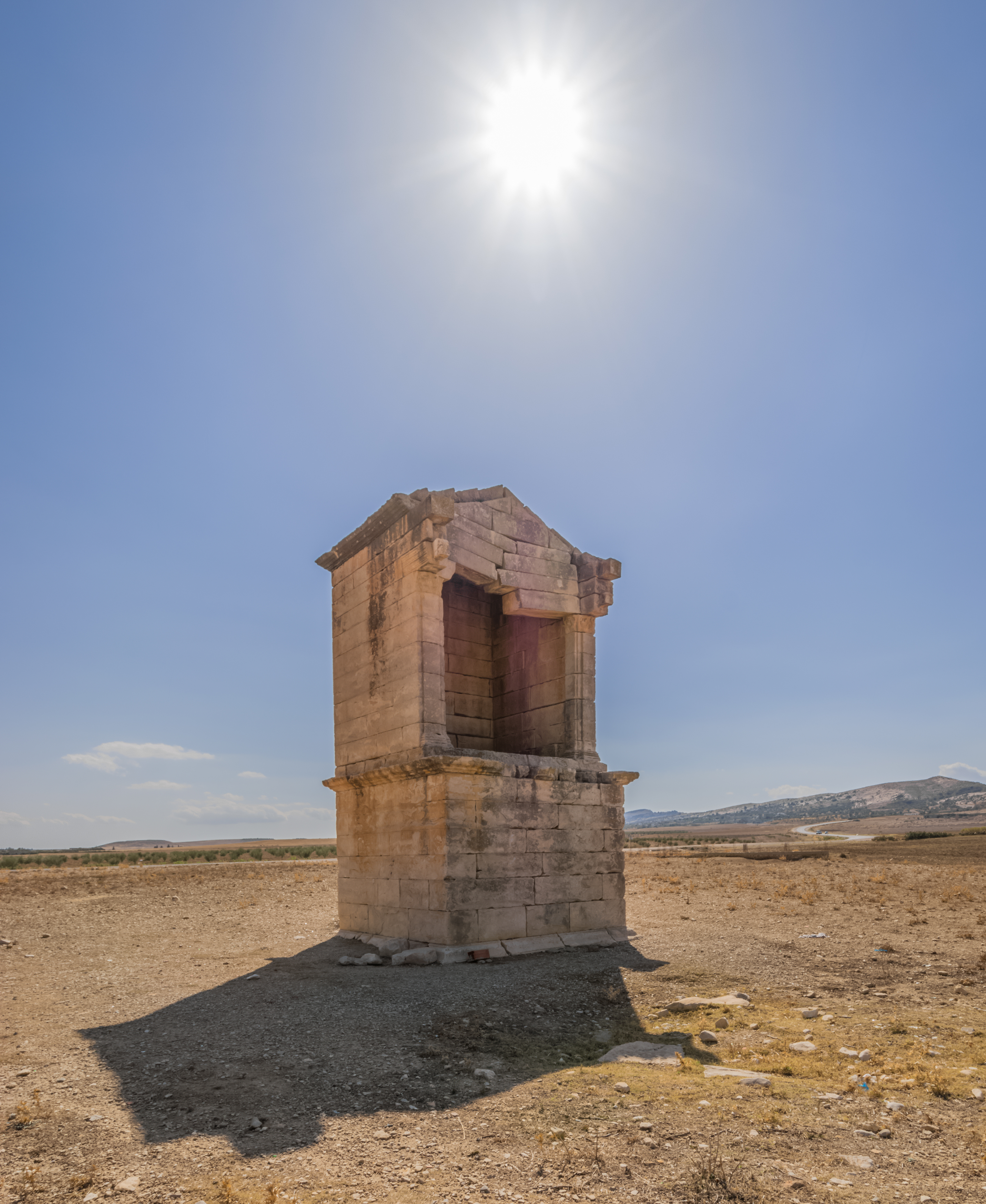 Mausolée de C. Marius Romanus : ce mausolée est situé dan la cité antique d'Aggar entre Oueslatia et Siliana, un site archéologique de l'époque byzantine